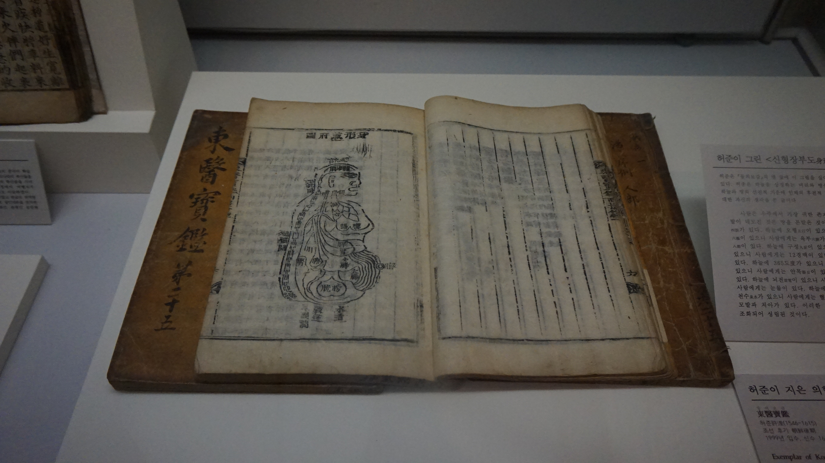 동의보감 (2)